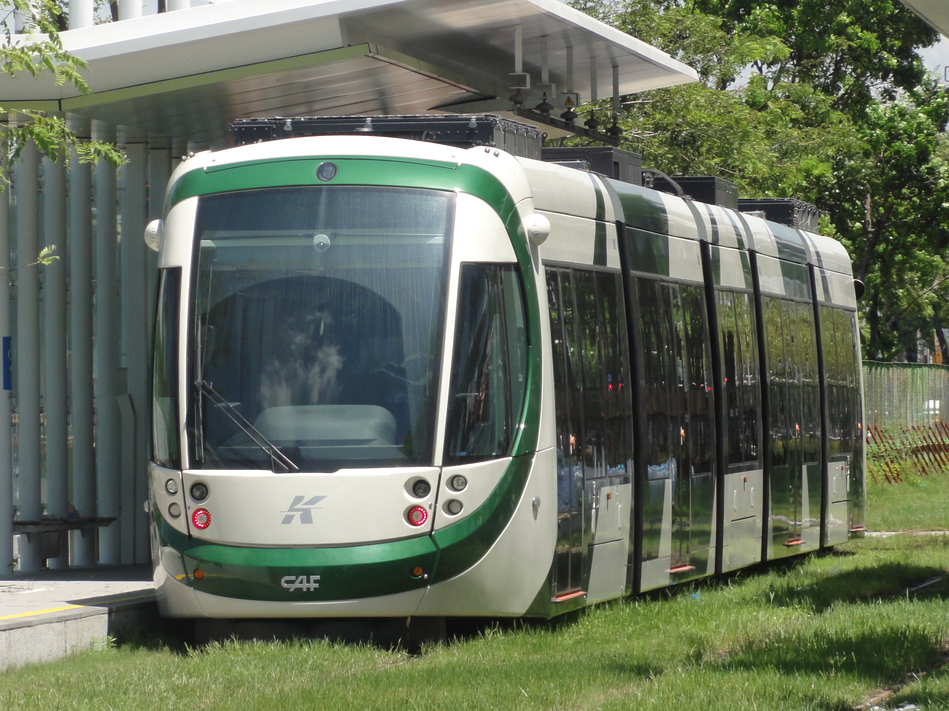 高雄LRT